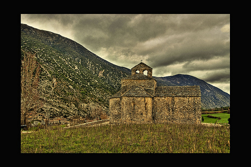 Dia de tempesta sobre les valls de Cabó.